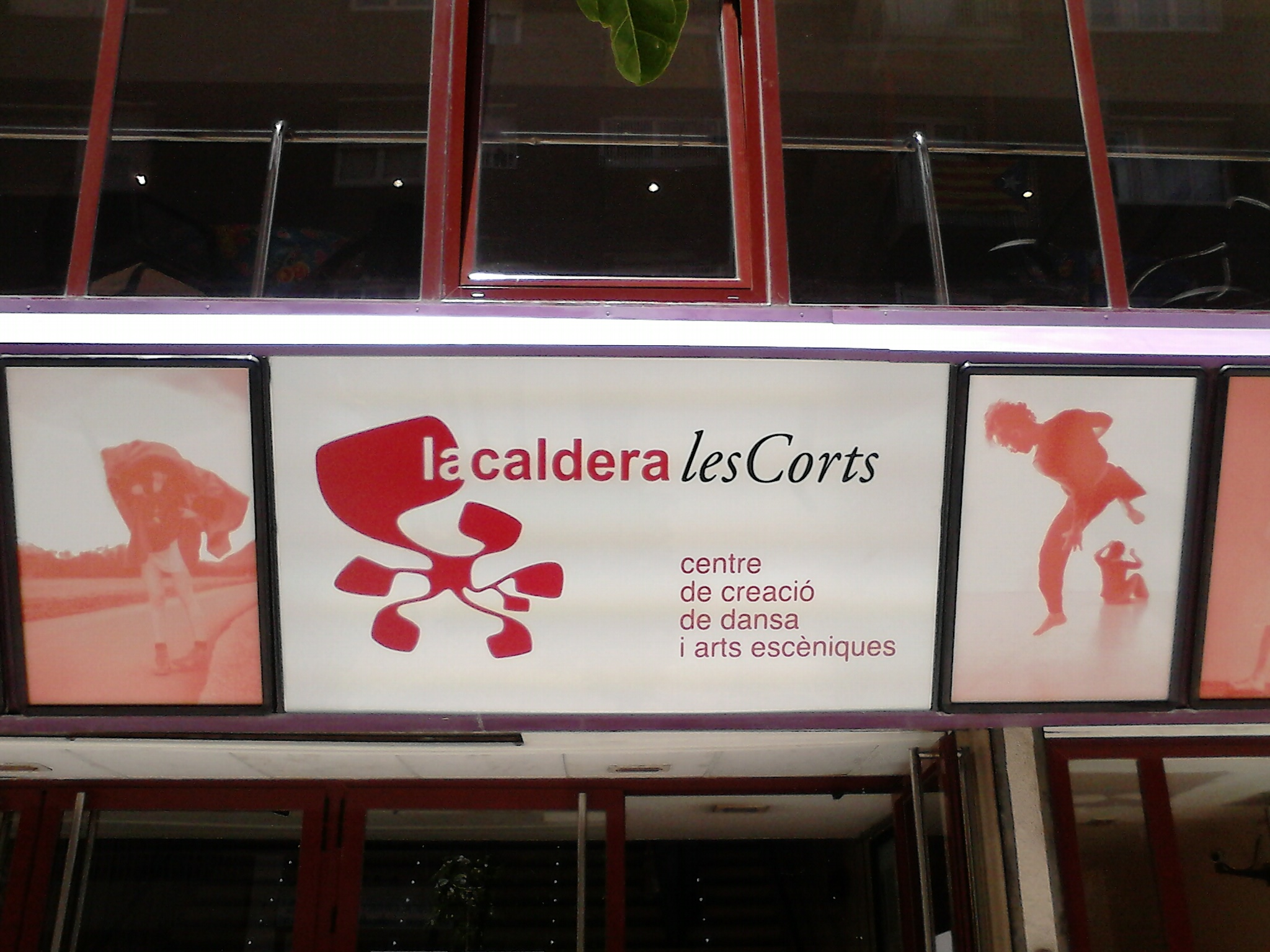 Façana edifici La Caldera Les Corts